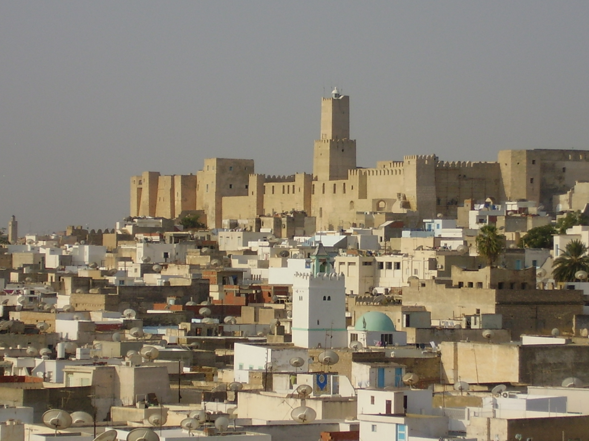 Kasba s medinou v Sousse